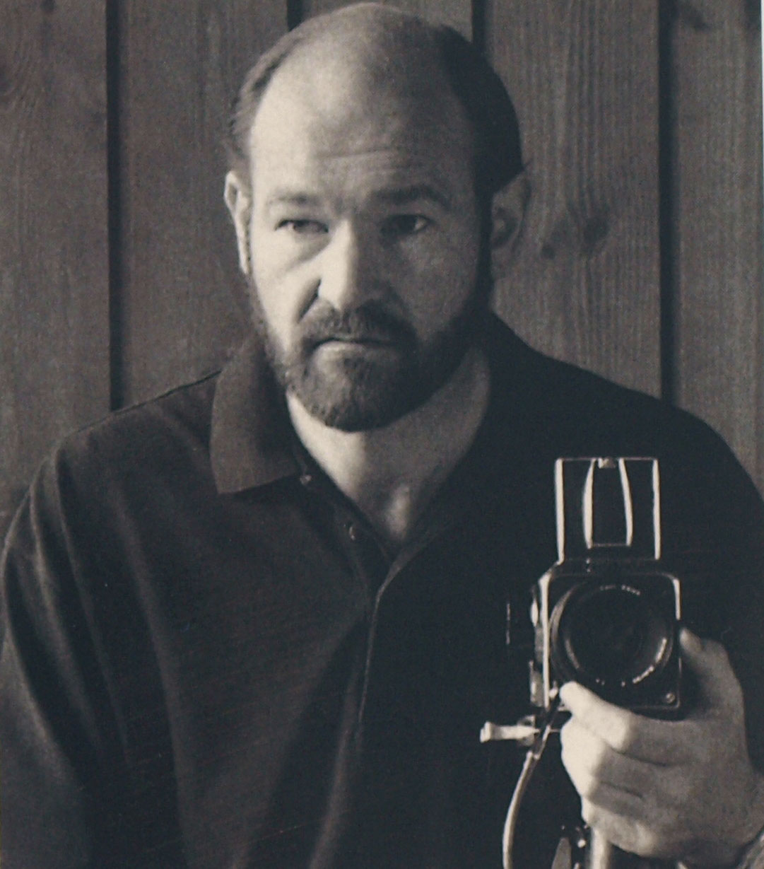 Selbstporträt des Fotografen Reiner Metzger